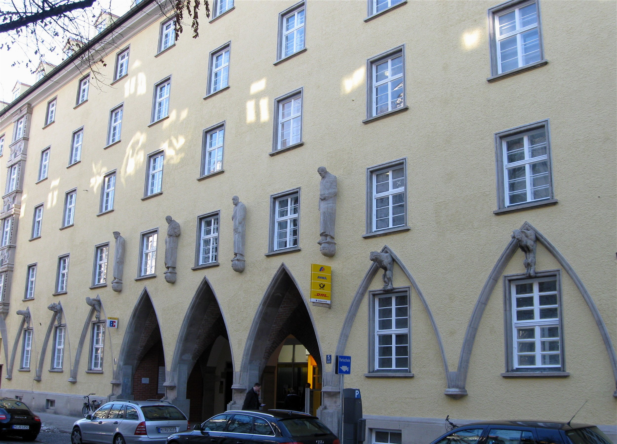 Agnesstraße 1/3/5; Postgebäude mit Postamt München 43, Block mit Anklängen an den Expressionismus und reichem Steinfigurenschmuck, 1925-26 von Robert Vorhoelzer und Franz Holzhammer